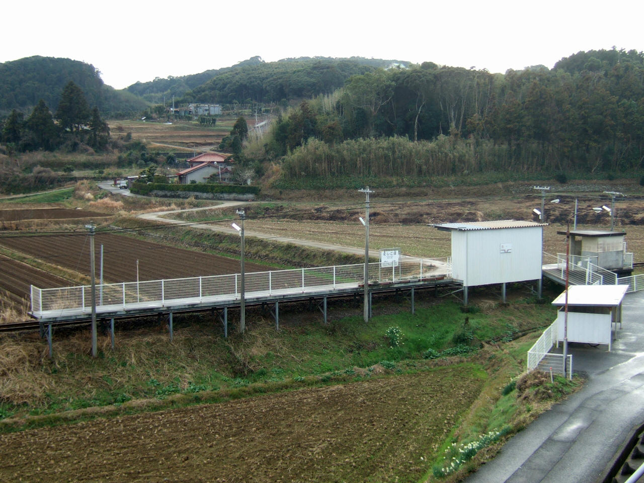 松浦鉄道西木場駅（Matsuura Railway Nishikoba Station）